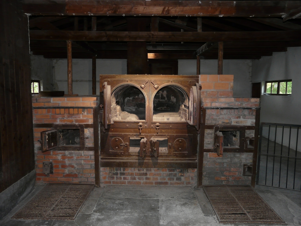 Die beiden Verbrennungsöfen des ersten Krematoriums im Konzentrationslager Dachau